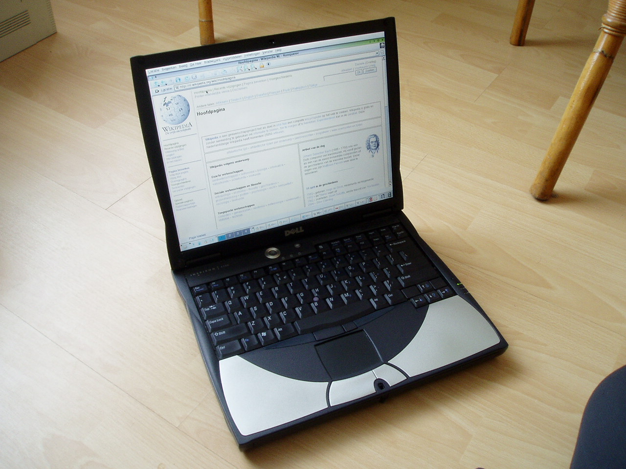 Laptop van Danielm. Categorie:Wikipedia:Afbeeldingen met GNU/GFDL Licentie